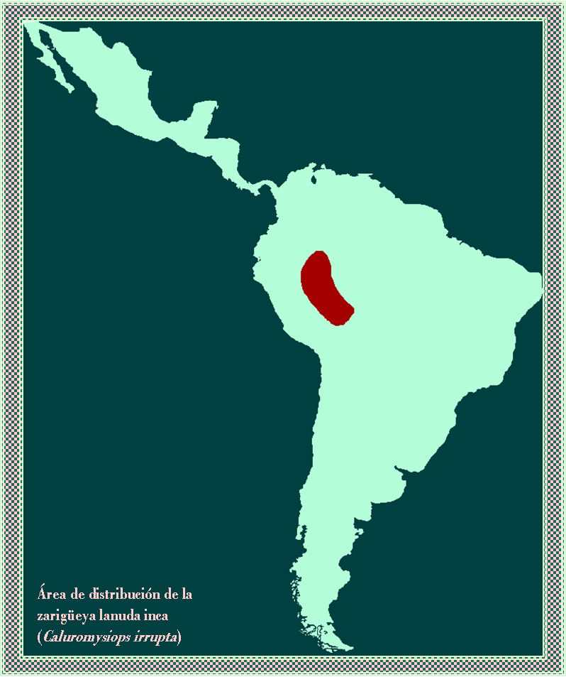 Mapa del área de distribución de Caluromysiops irrupta